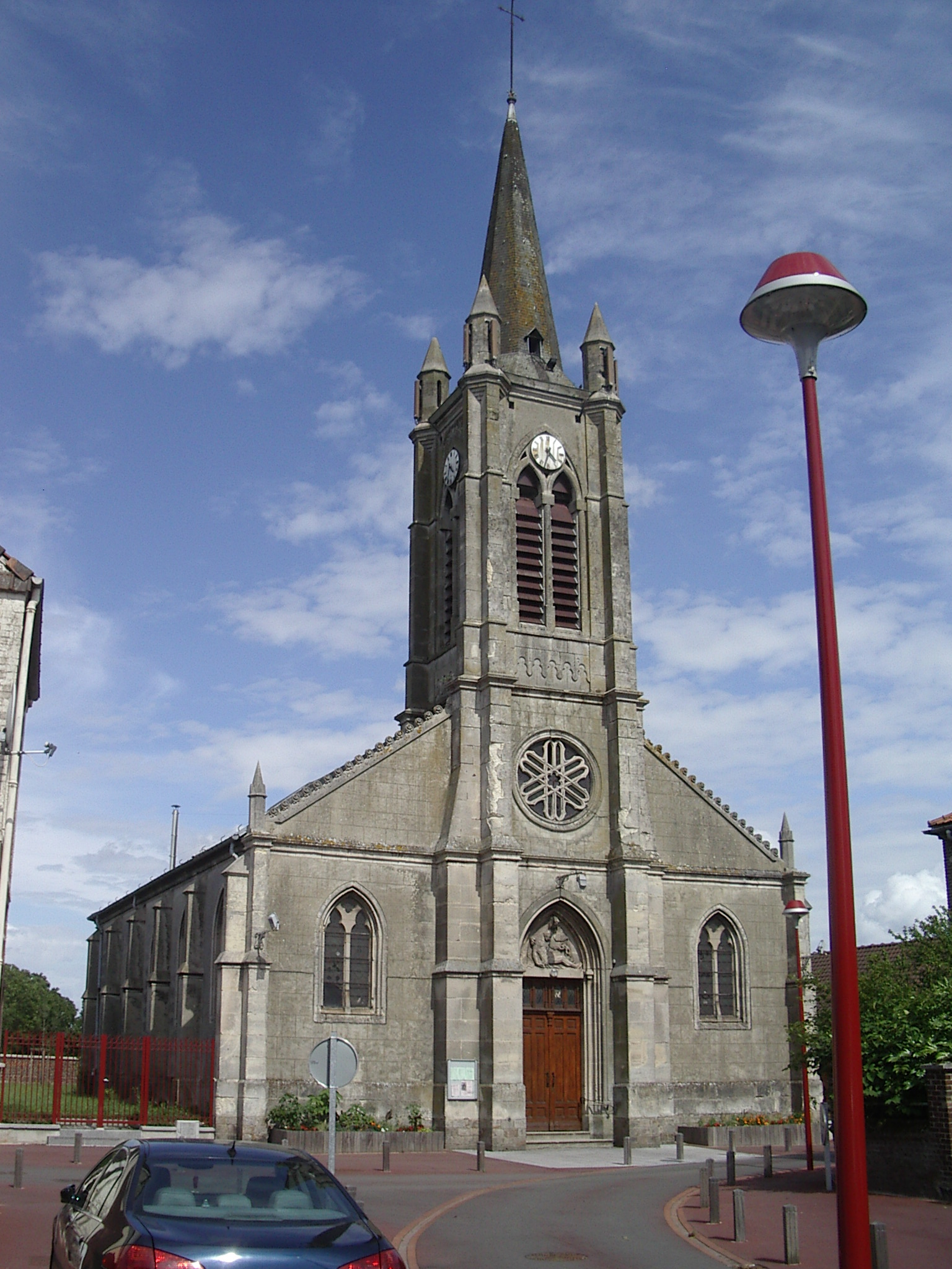 Eglise de Vicq (France, Nord)